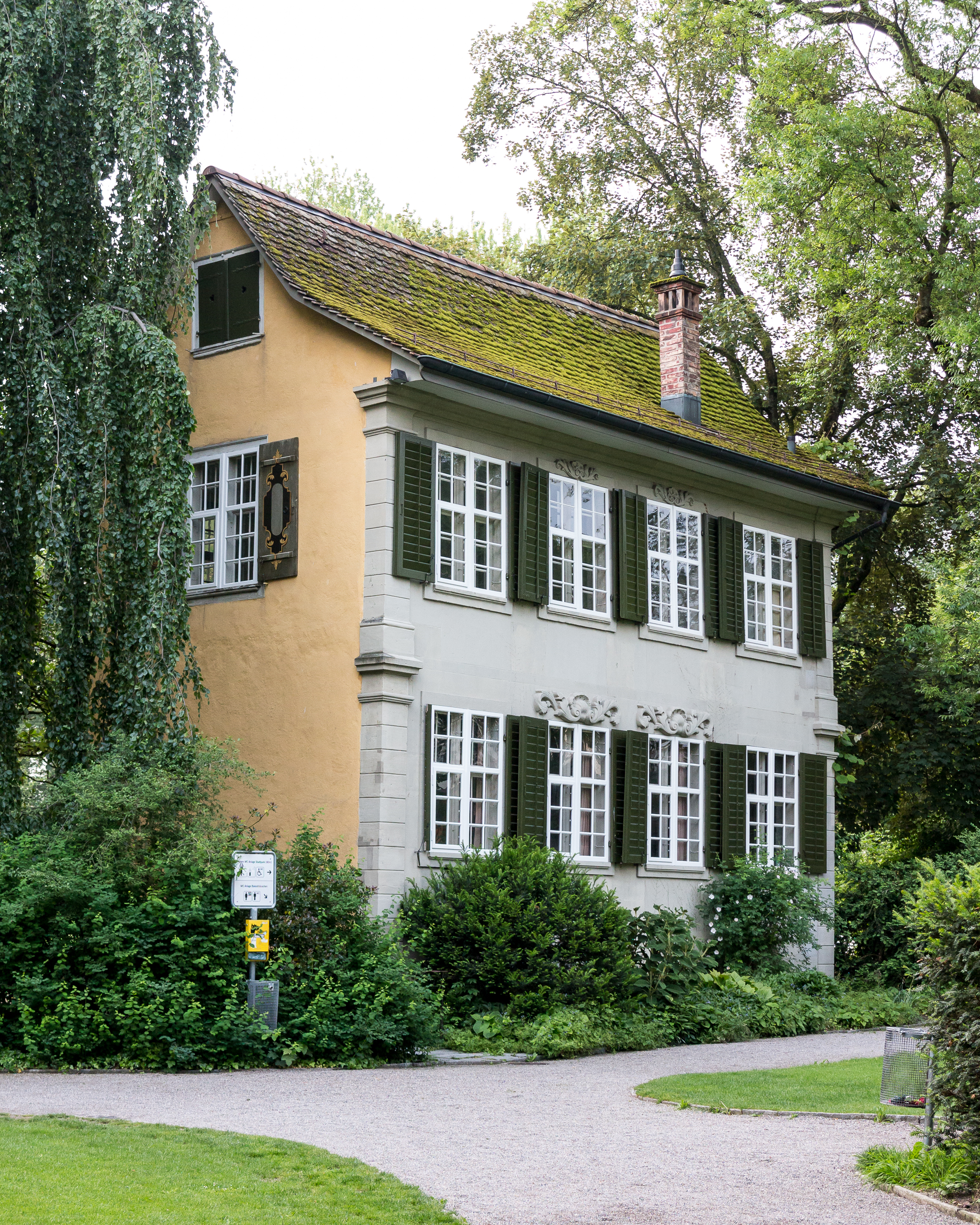 Haus zum Balustergarten ID 23700531